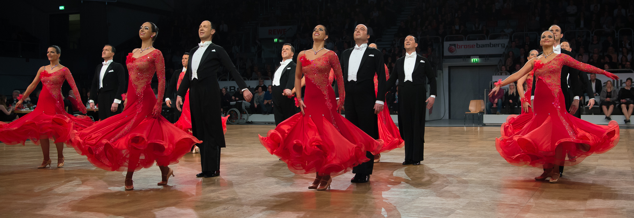 Brose Arena Bamberg,Deutsche Meisterschaften der Formationen Standard & Latein 2016,Standard,TC Bernau,Tanzsport